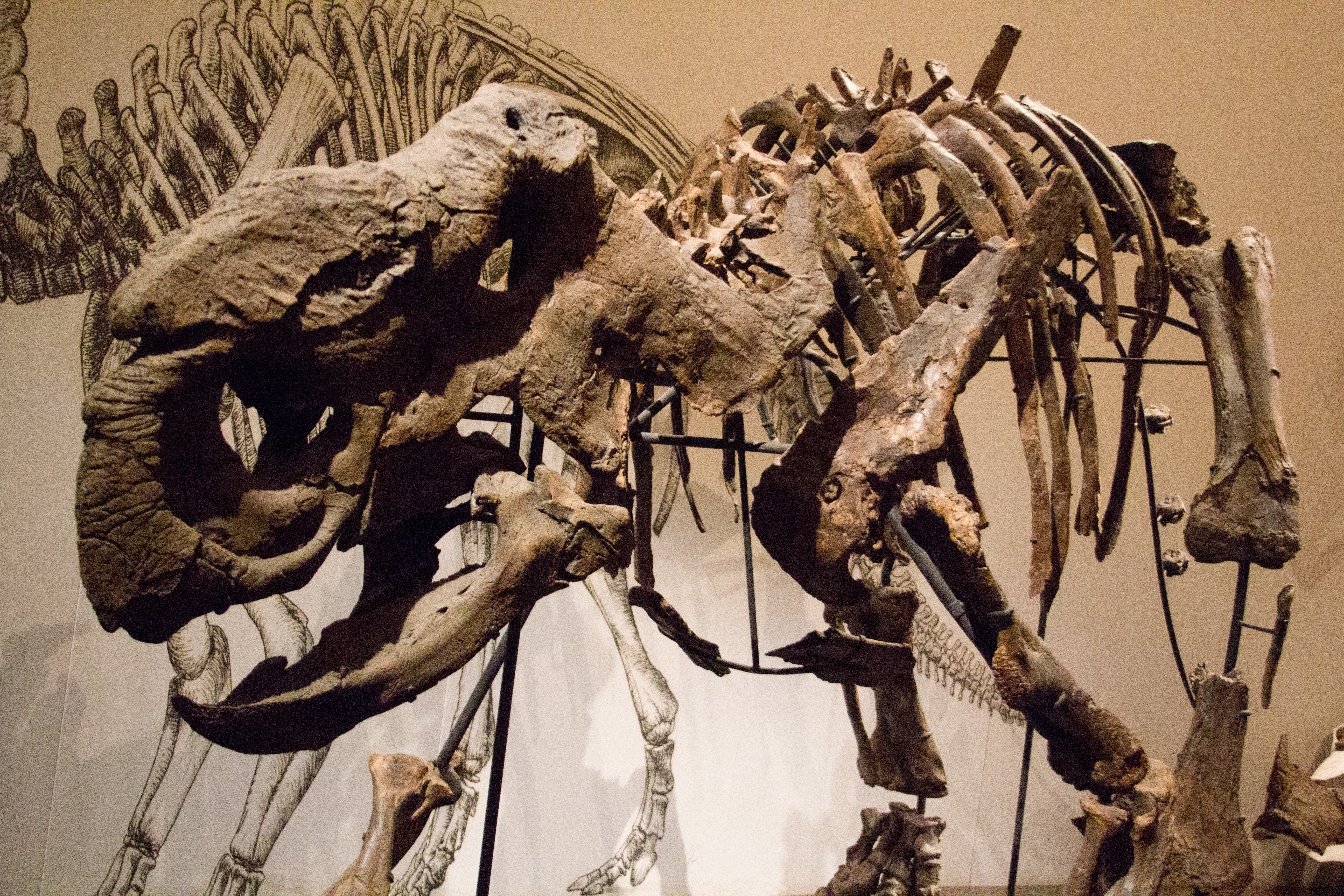 2ti-drumheller-last-day-20120804-36.jpg